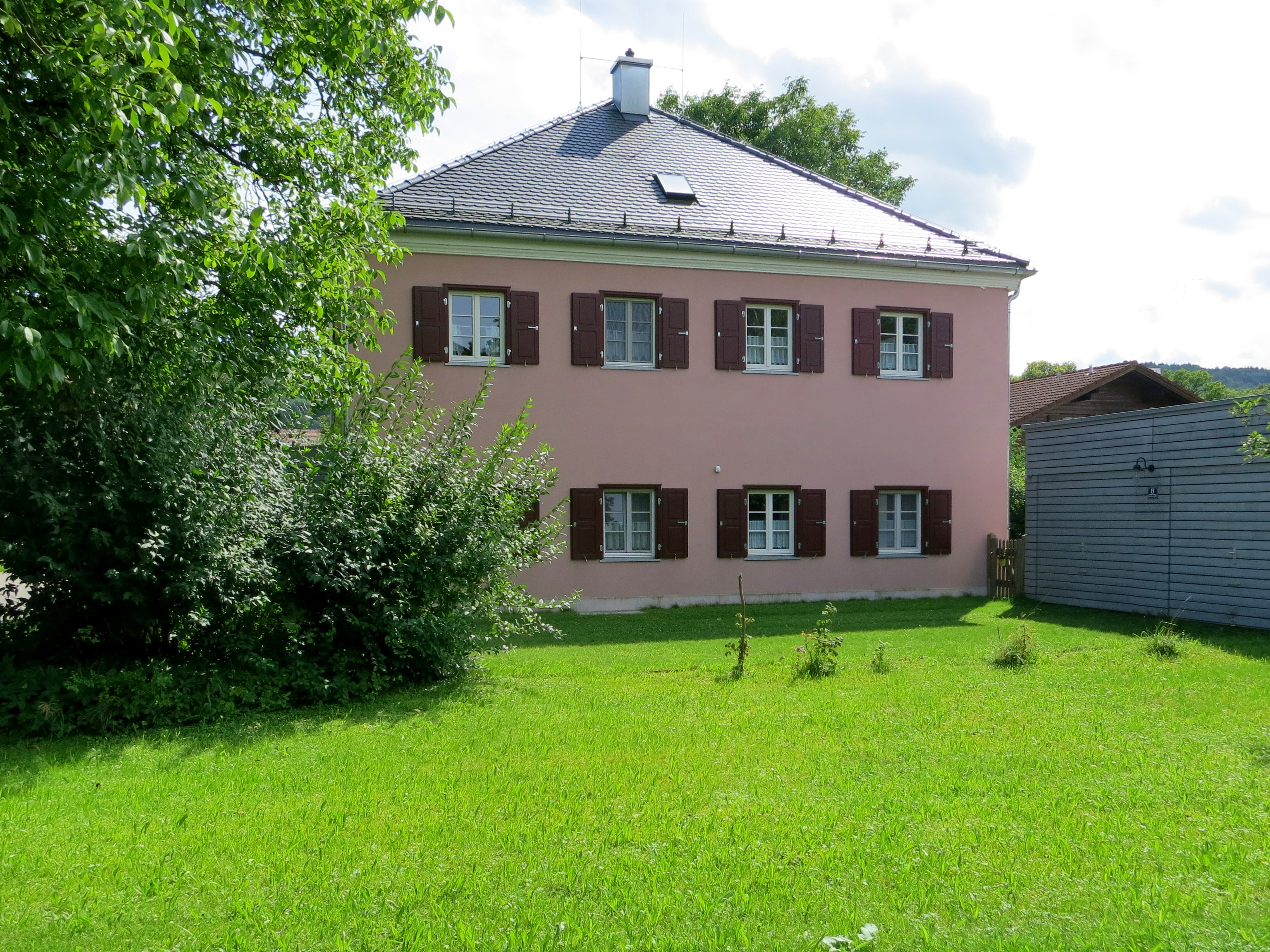 Ehemaliges Benefiziatenhaus in Vagen (Gemeinde Feldkirchen-Westerham) - Ansicht aus Nord